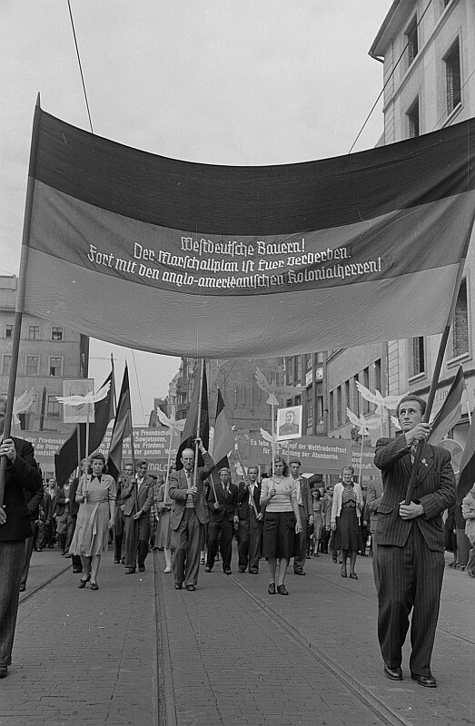 Original image description from the Deutsche FotothekTeilnehmer einer Demonstration mit Spruchbannern, Friedenstauben und einem Bildnis Stalins in der Grimmaischen Straße